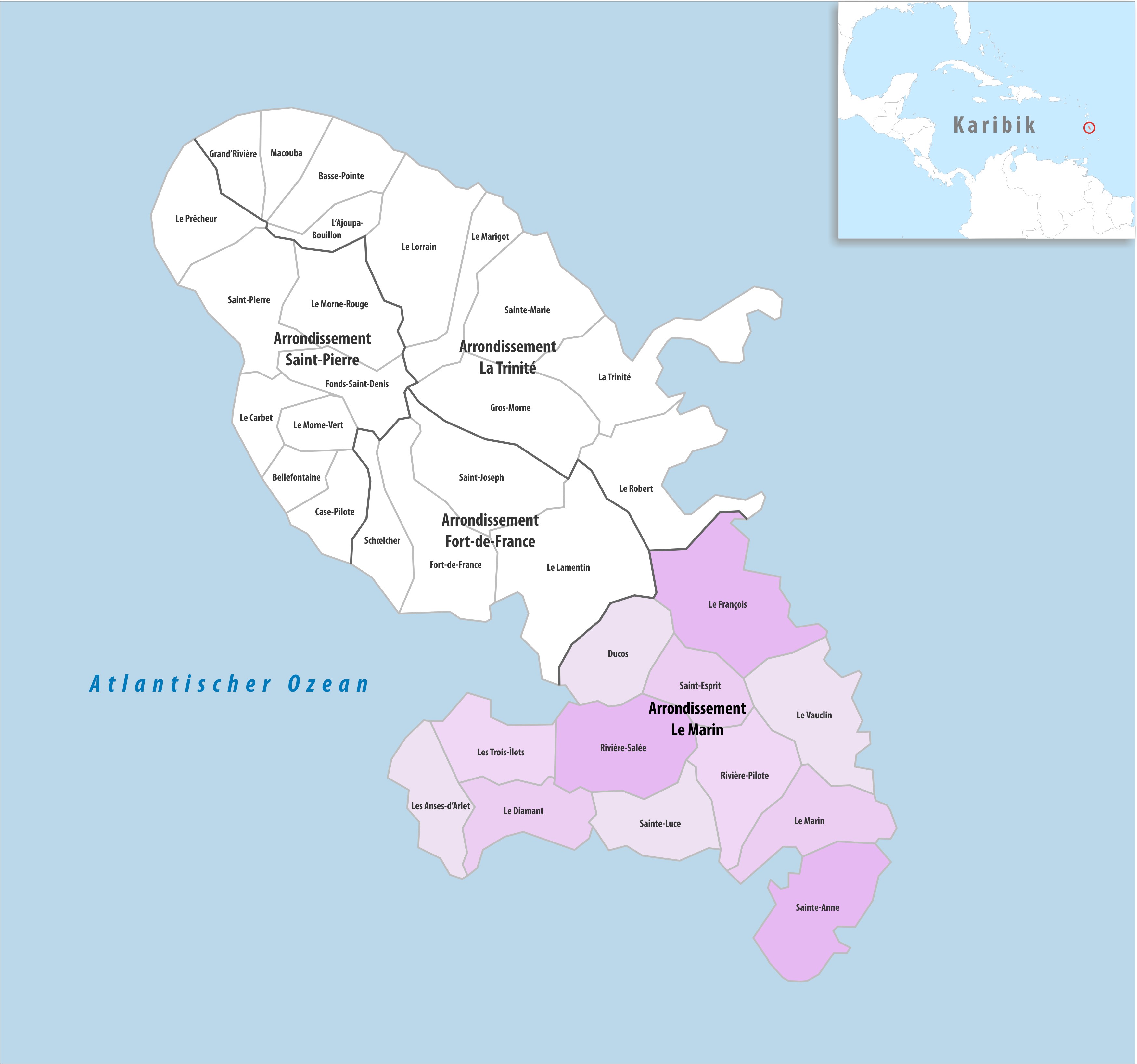 Lage des Arrondissements Le Marin